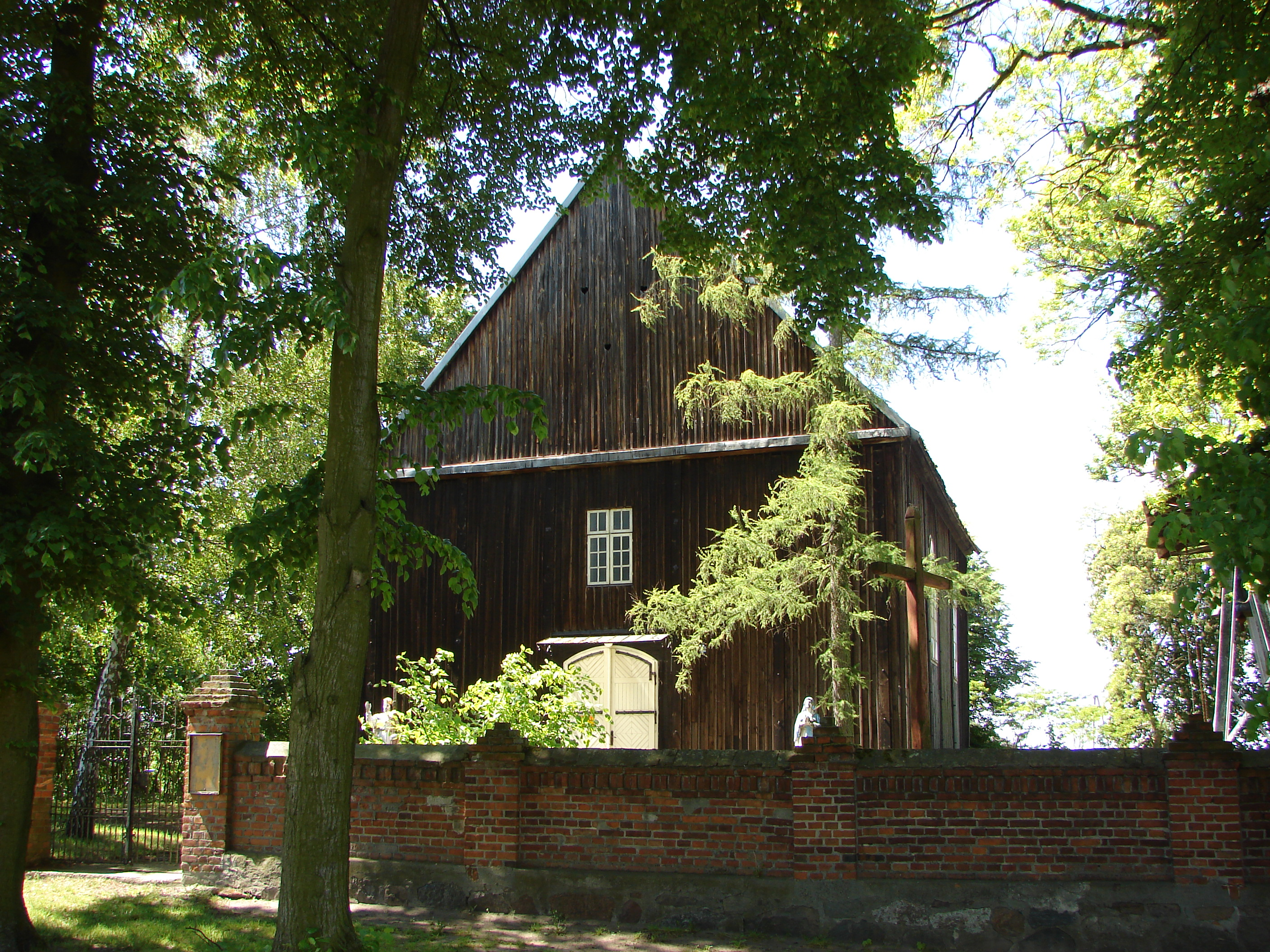 Dąbie Kujawskie - rzymskokatolicki kościół parafialny p,w. Świętej Trójcy, drewn., 1789